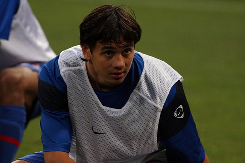 Andrei Ionescu